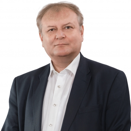 Hiller István (Sopron, 1964. május 7. –) magyar történész, politikus, 2006 és 2010 között oktatási és kulturális miniszter, 2004-től 2007-ig az MSZP elnöke, 2014. május 6-tól a Magyar Országgyűlés alelnöke. 2016-tól az MSZP választmány elnöke.